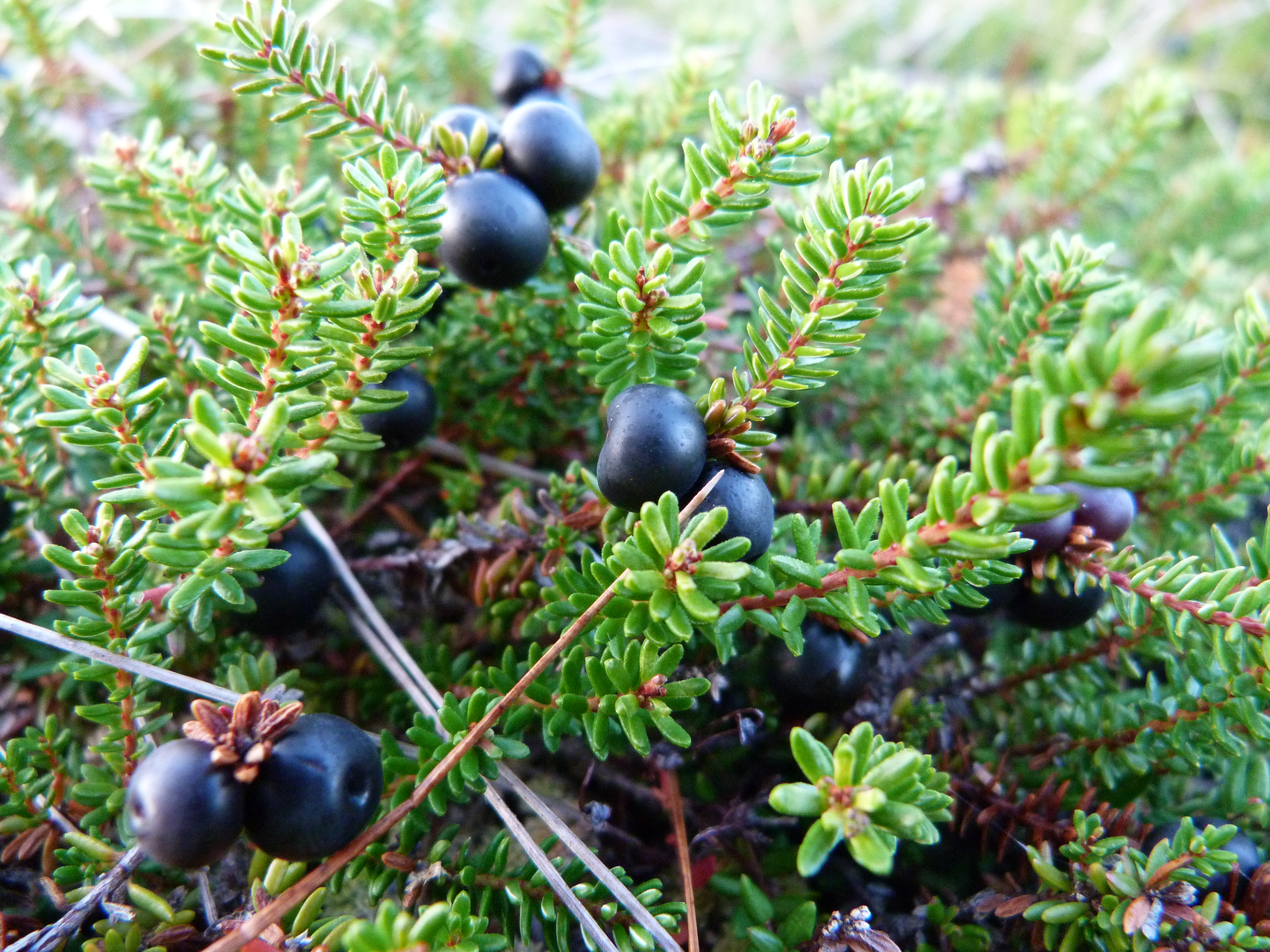 Camarine noire (Empetrum nigrum) au Tanet (massif des Vosges).